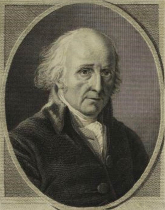 Charles Palissot, Musée de la Révolution française - Vizille